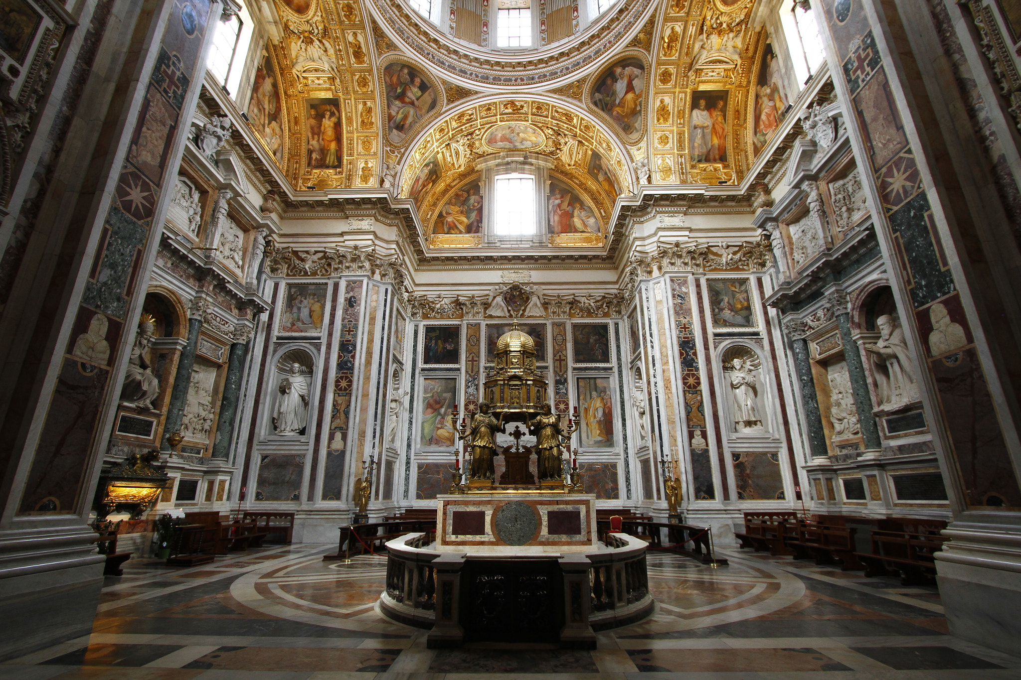 500px provided description: Sistine's Chapel in Basilica di Santa Maria Maggiore [#Basilica ,#Santa ,#Maria ,#Maggiore ,#Cappella ,#Chapels ,#Sistina]